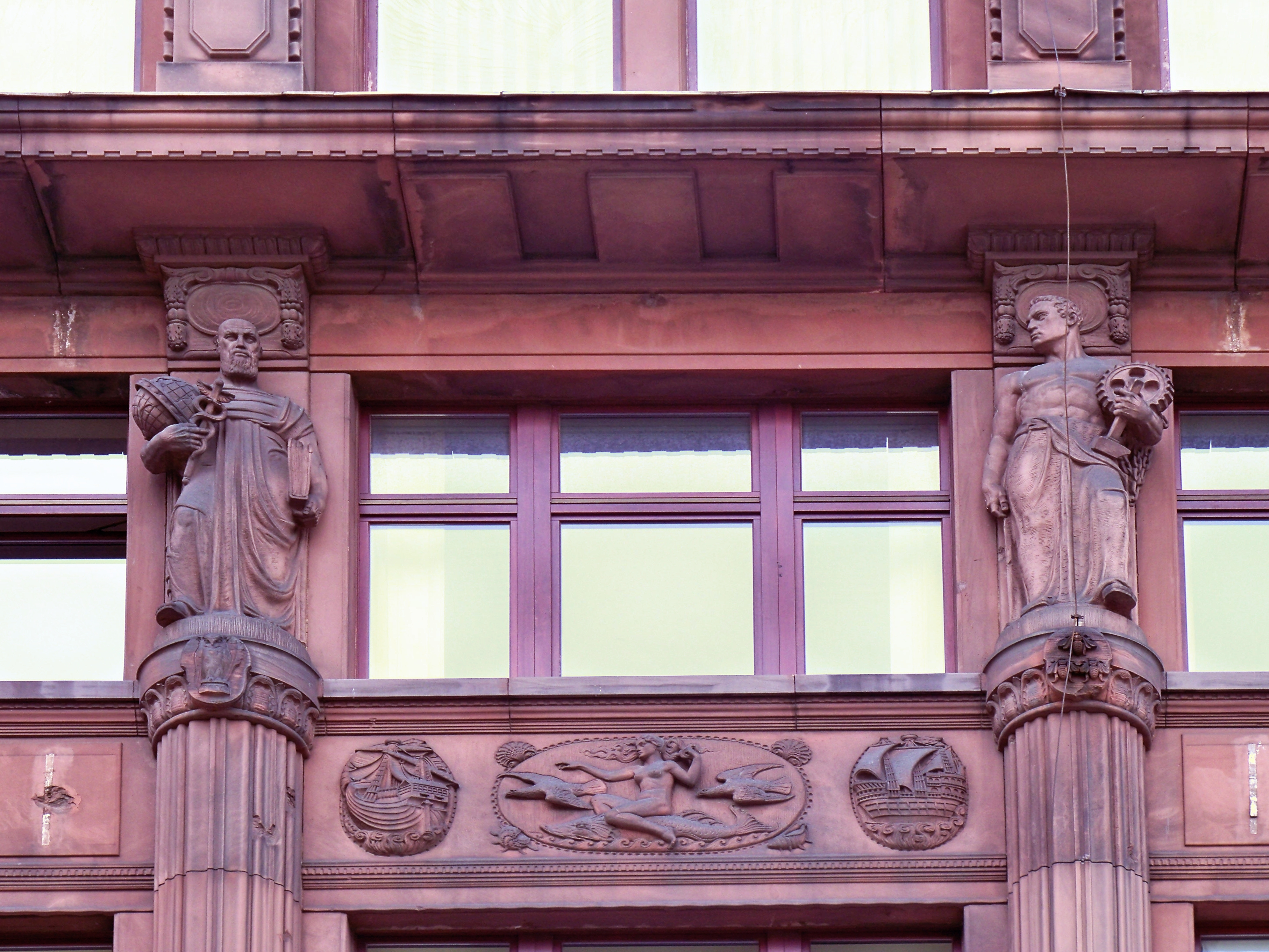 Dom pod św. Hieronimem we Wrocławiu